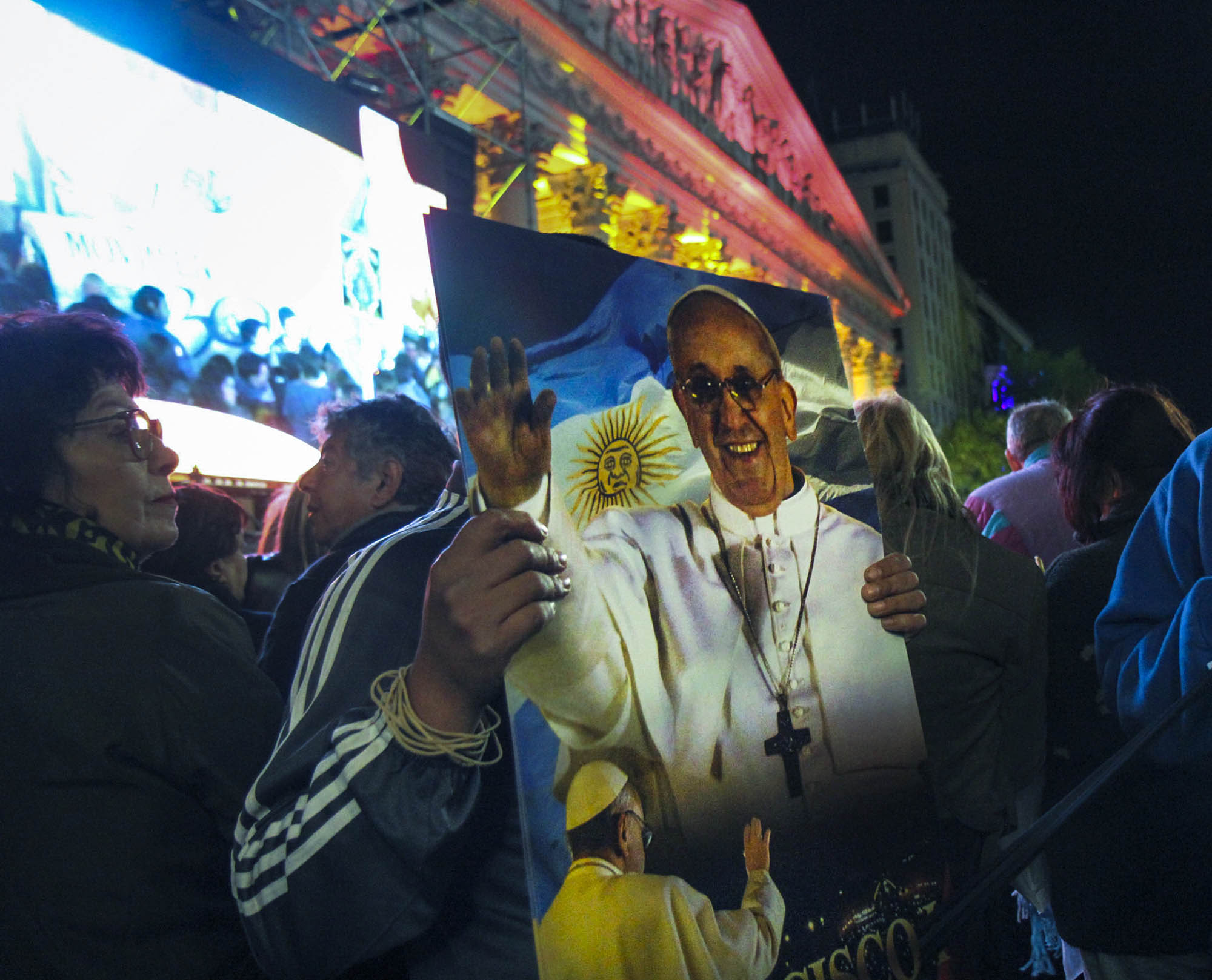 Buenos Aires. Marzo 19 de 2013.- Los fieles que se concentran en las inmediaciones de la Catedral Metropolitana a la espera de la entronación de Francisco como Papa de la Iglesia Católica, disfrutaron de un show artístico musical.